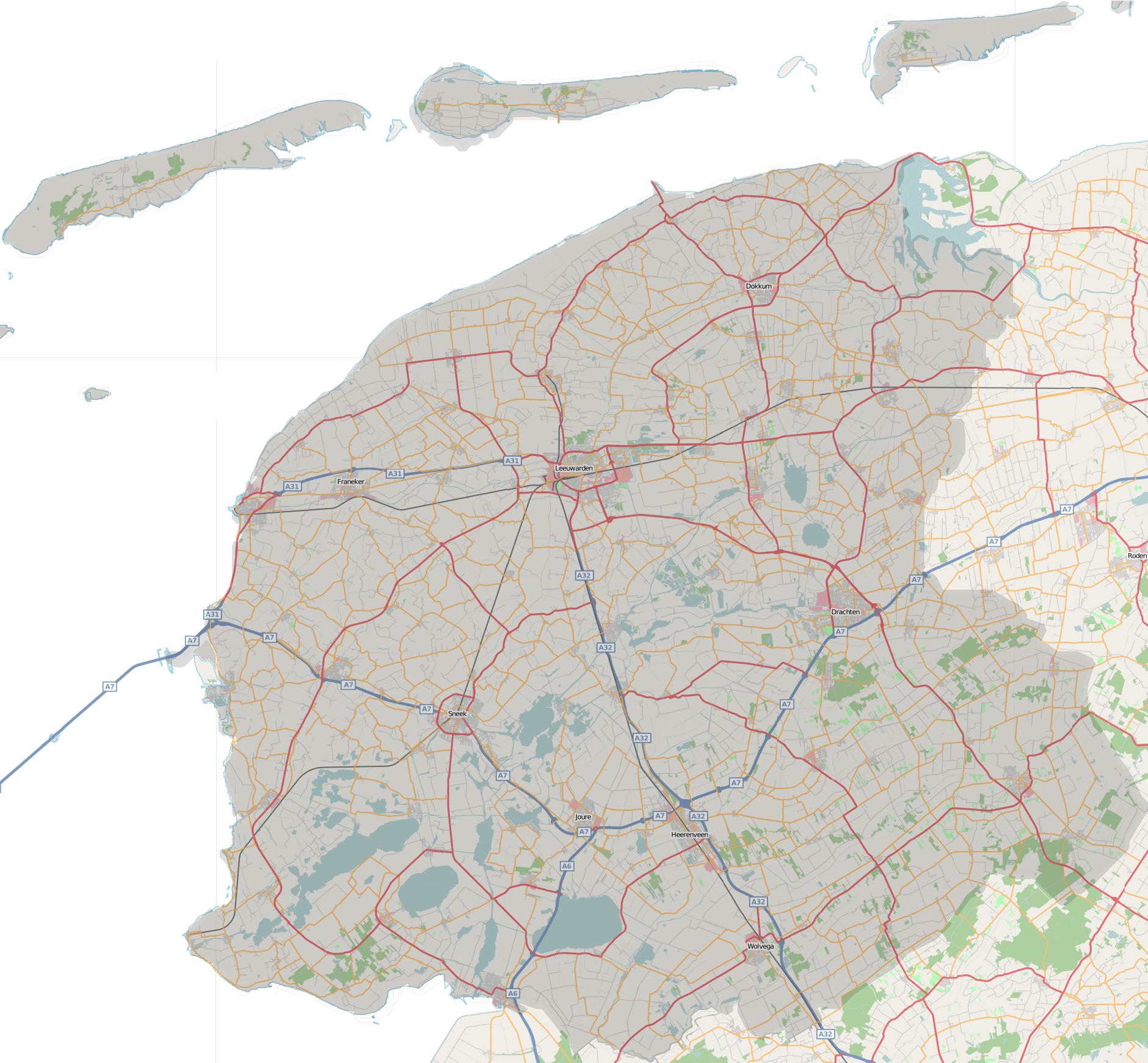 "Friesland"